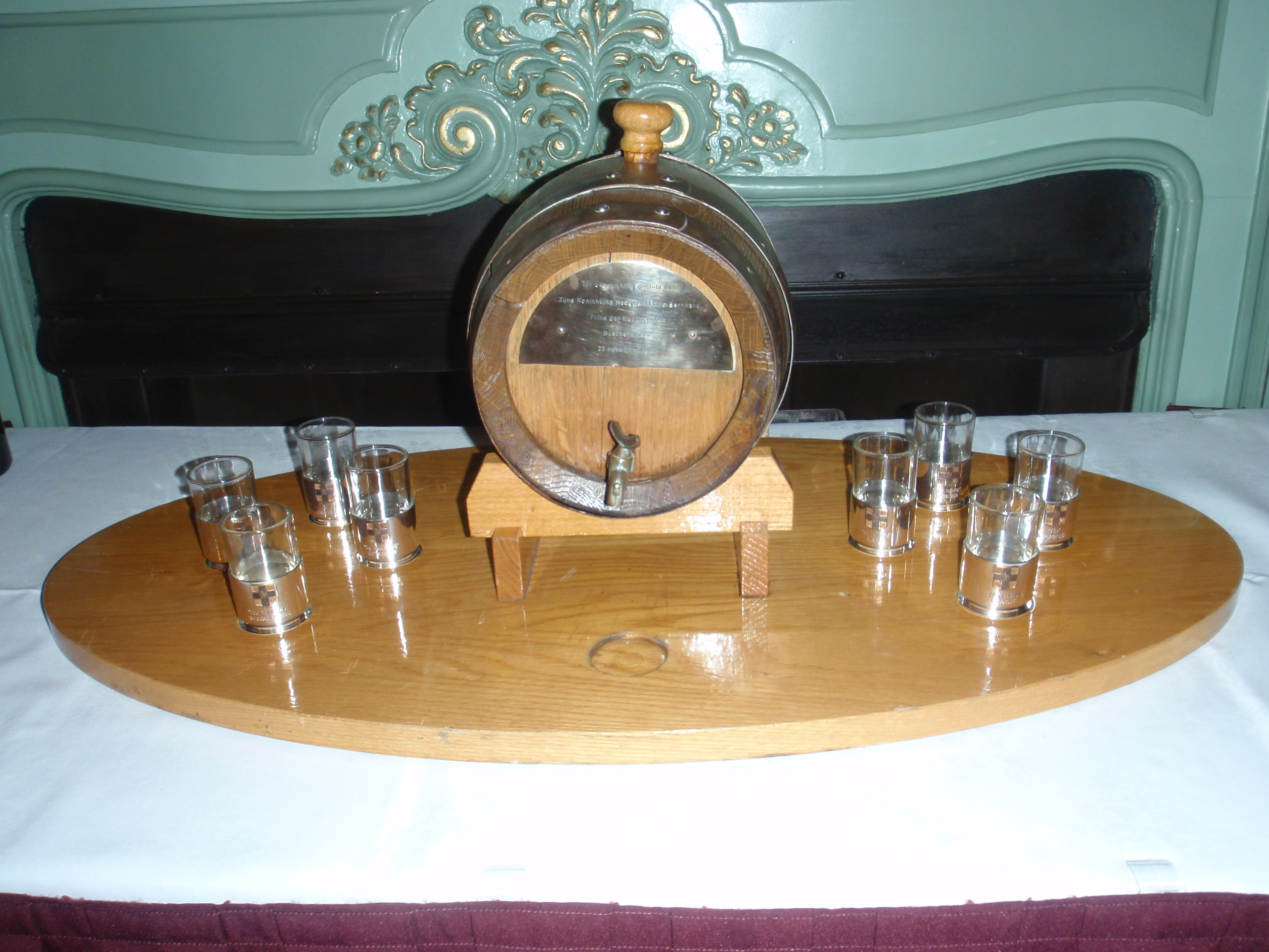 Foto: Korbaa